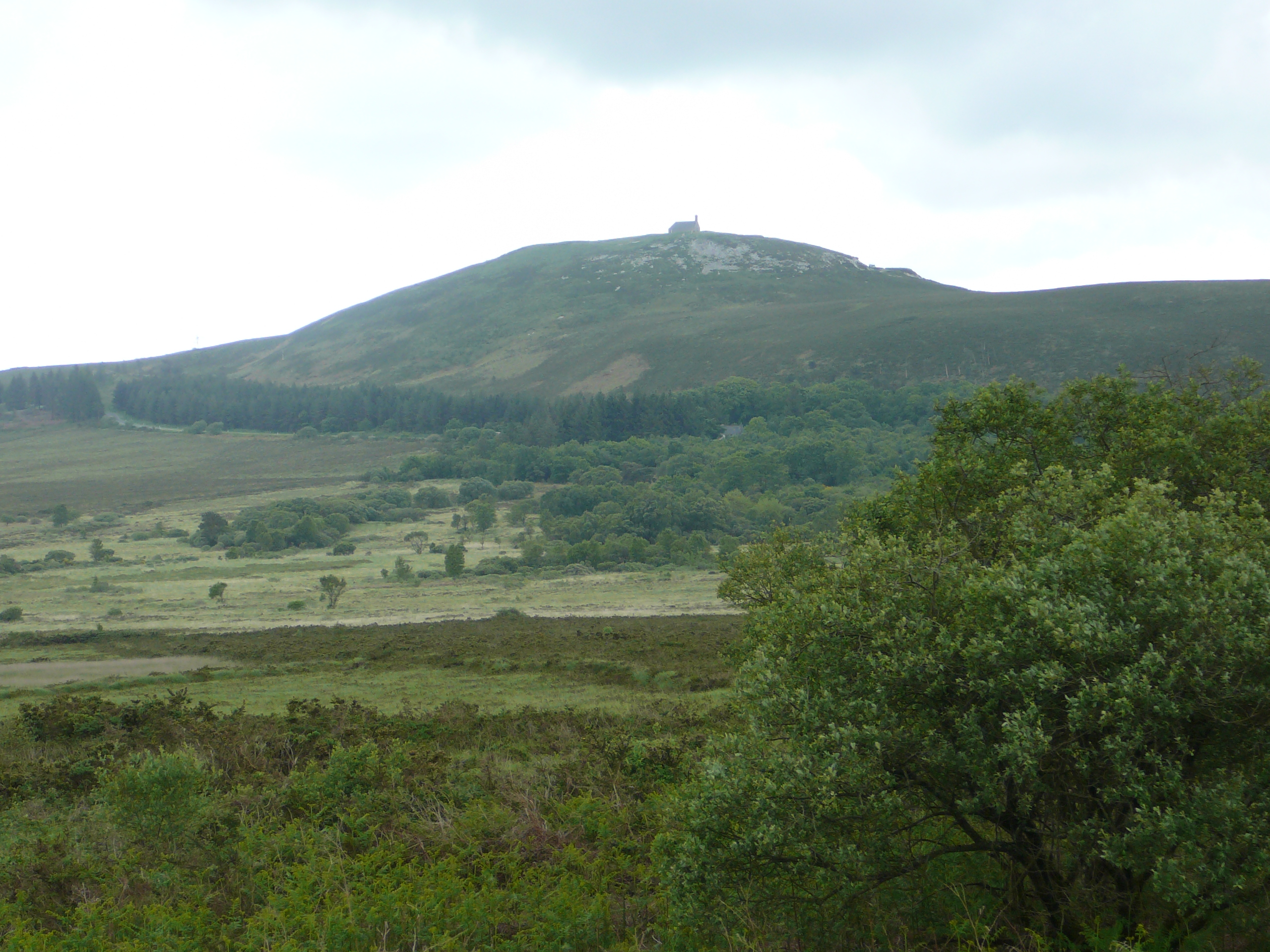 Le mont Saint-Michel de Brasparts et sa chapelle sommitale vus depuis Botmeur